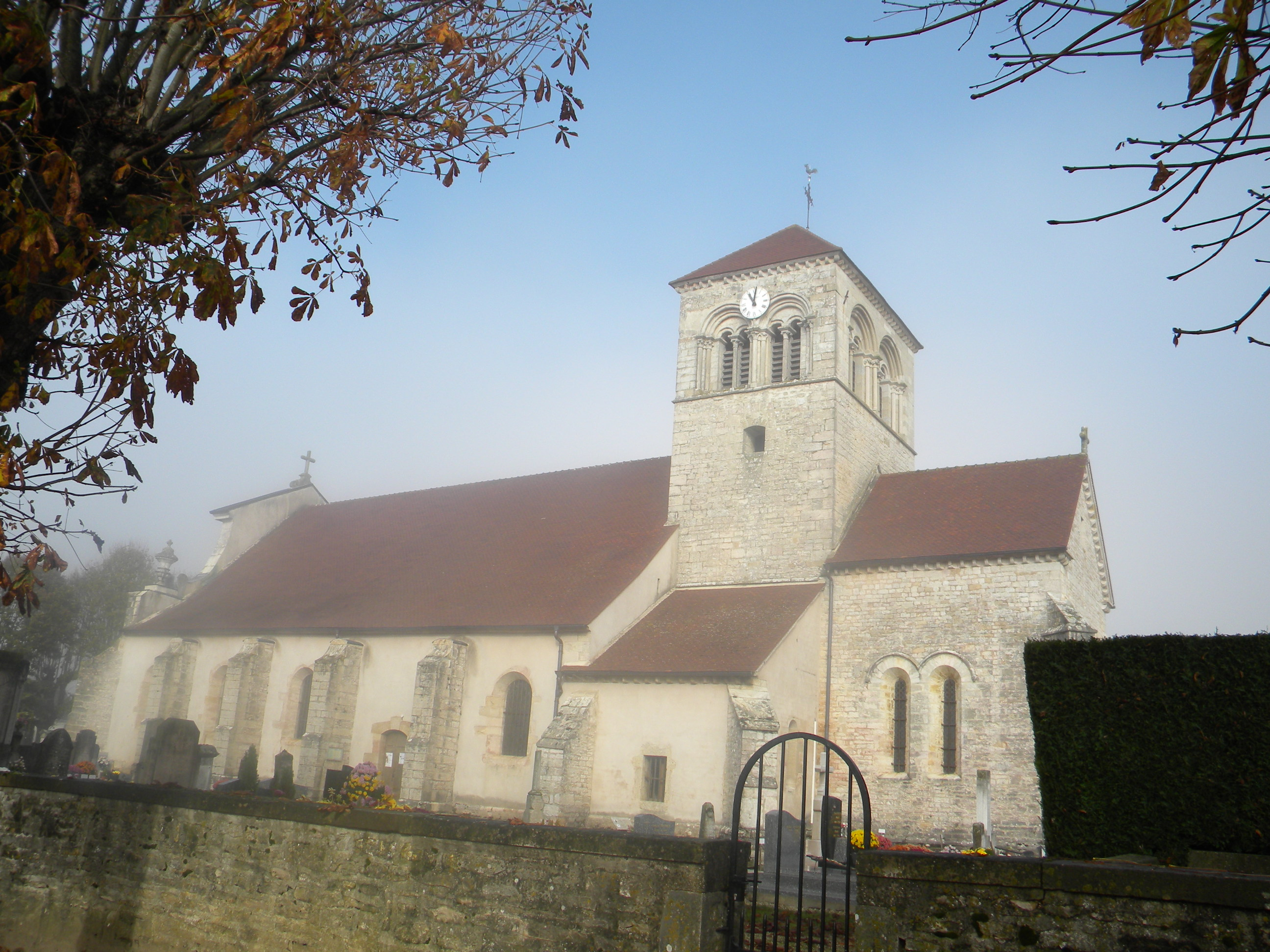 Preĝejo de Argilly